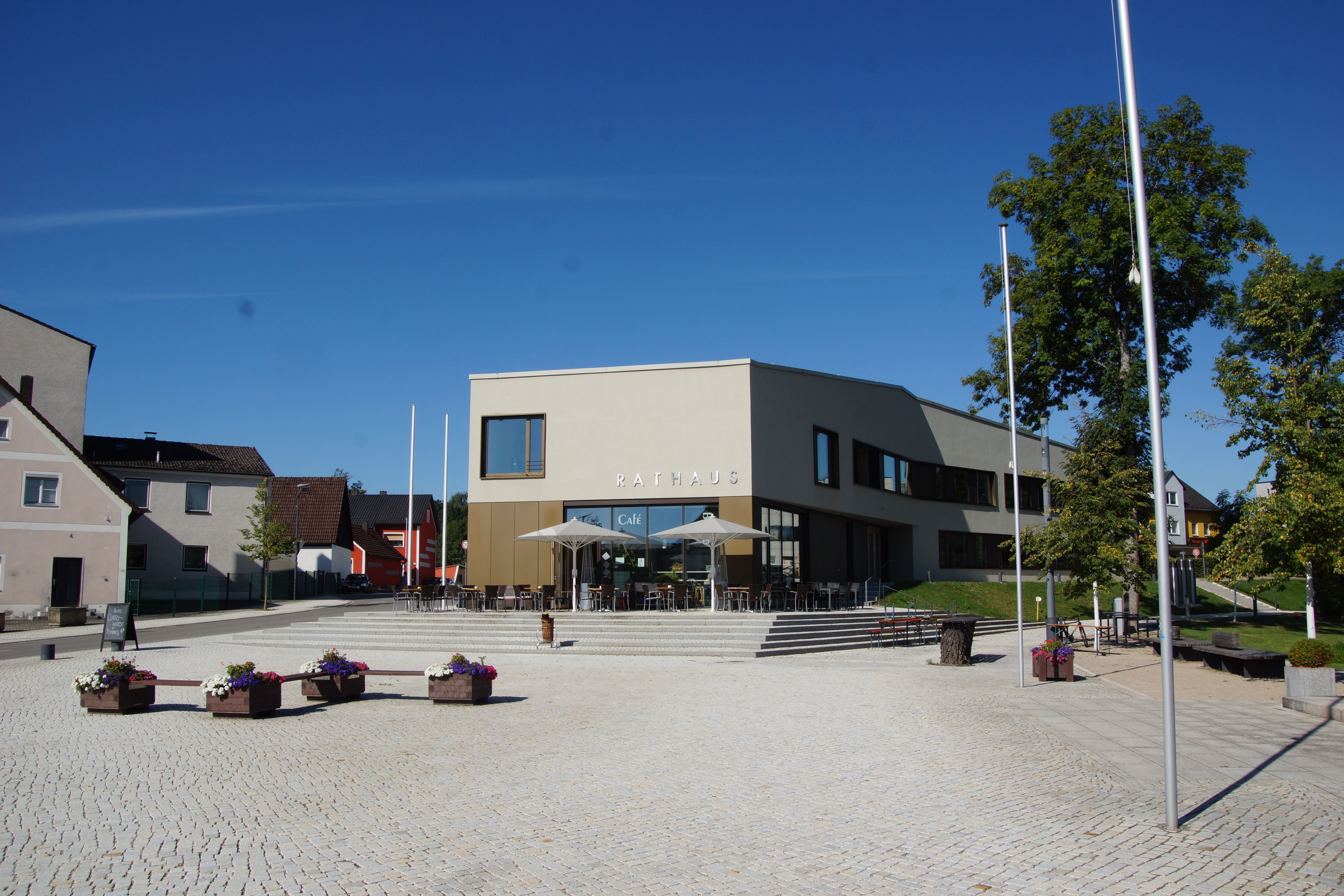 Weiherhammer